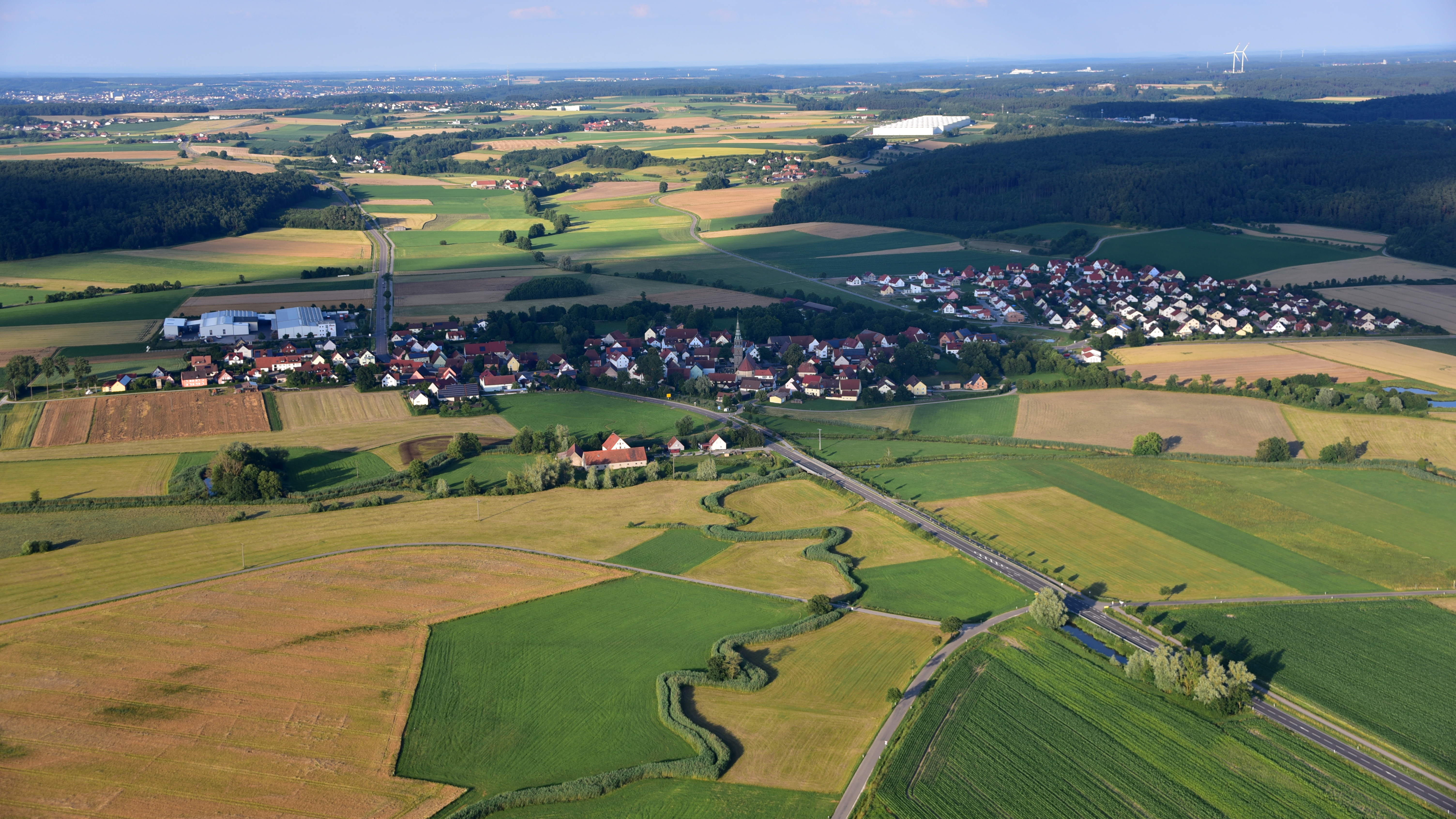 Neunstetten, Luftaufnahme (2016)